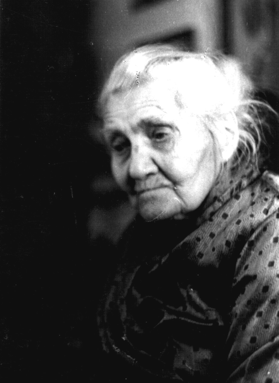 Ольга Дучимінська